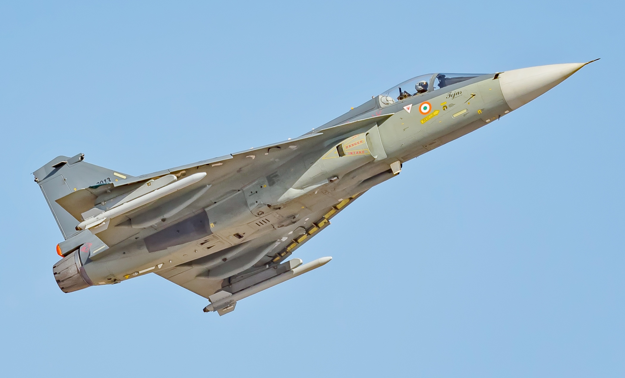 IAF Tejas full size